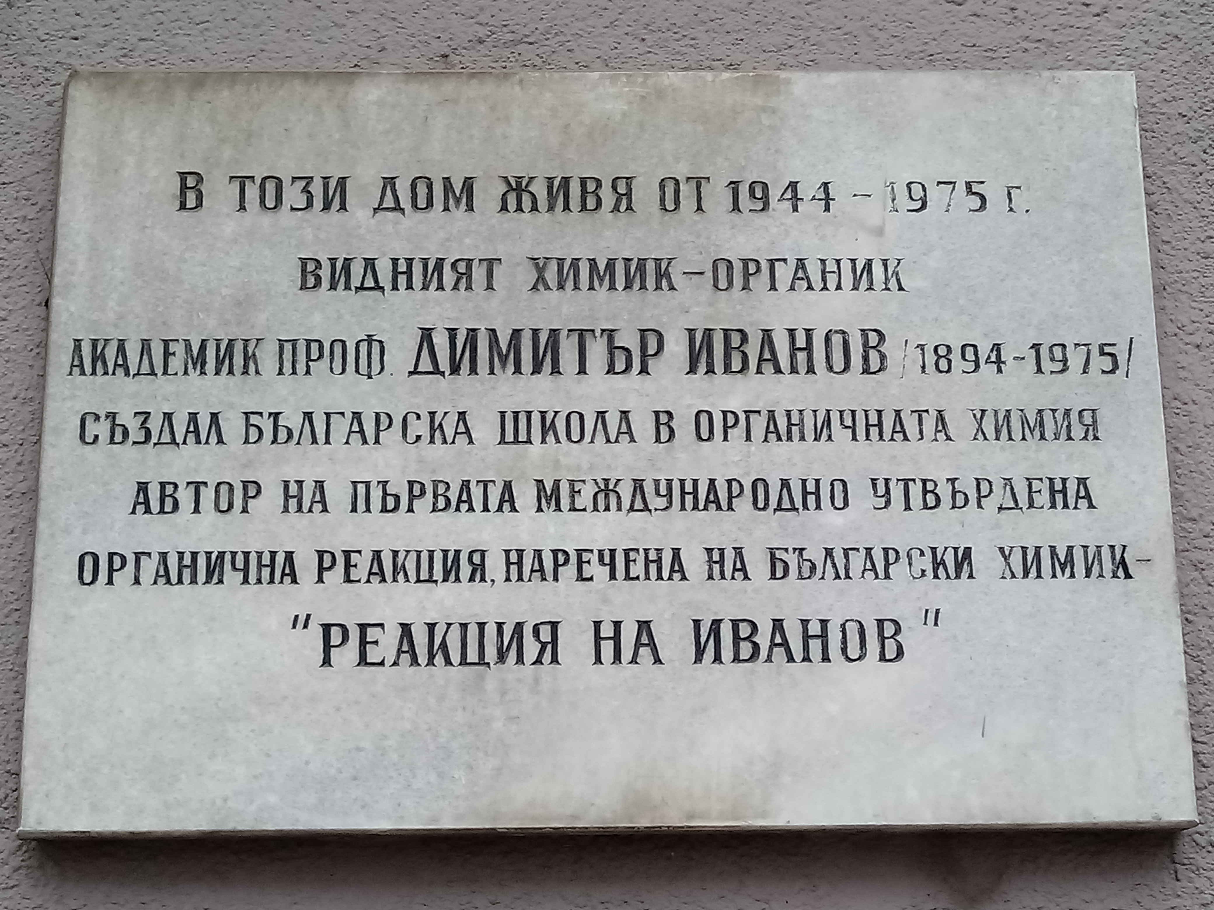 Dimitar Ivanov memorial plaque, 18 Madrid Blvd., Sofia